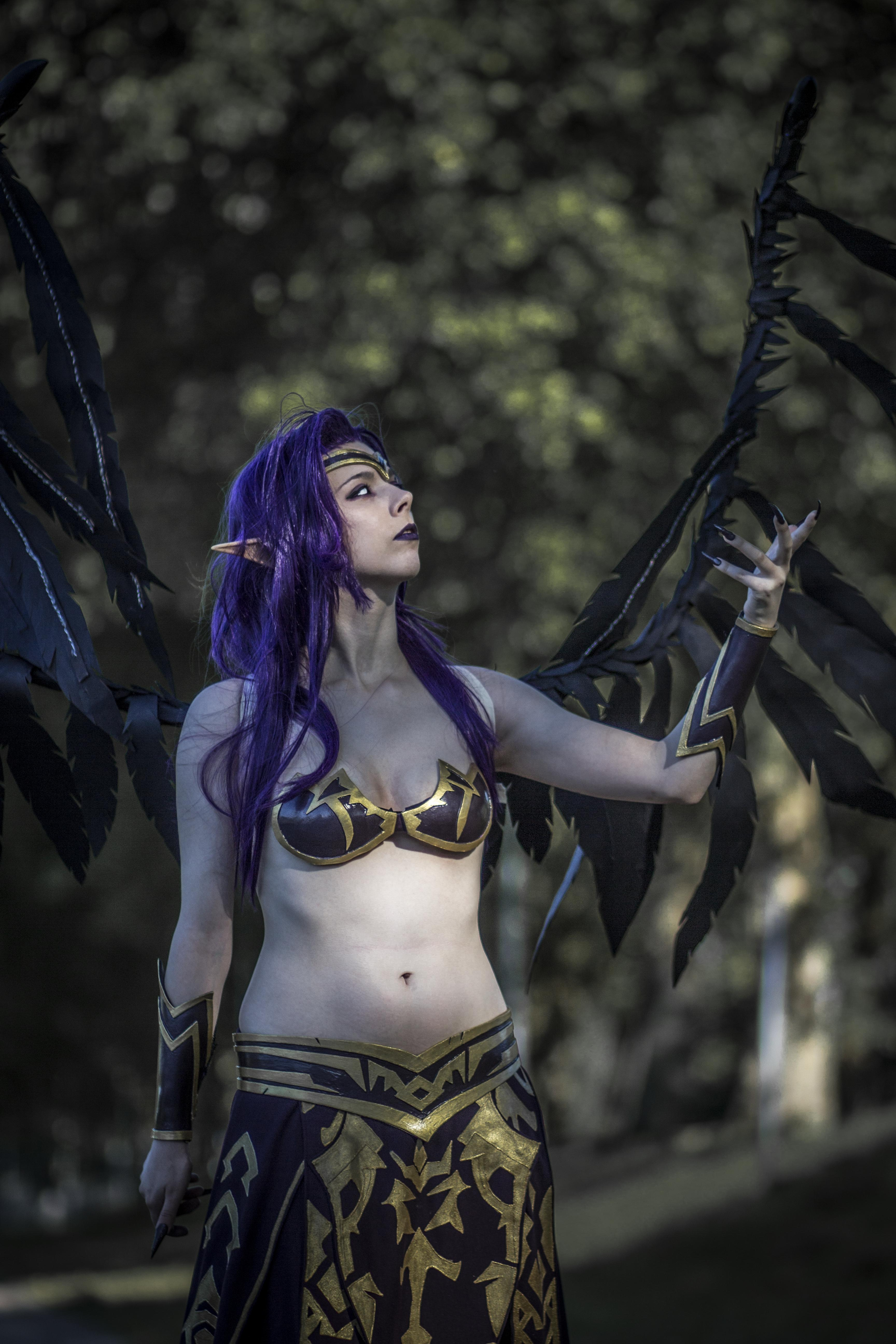 Morgana